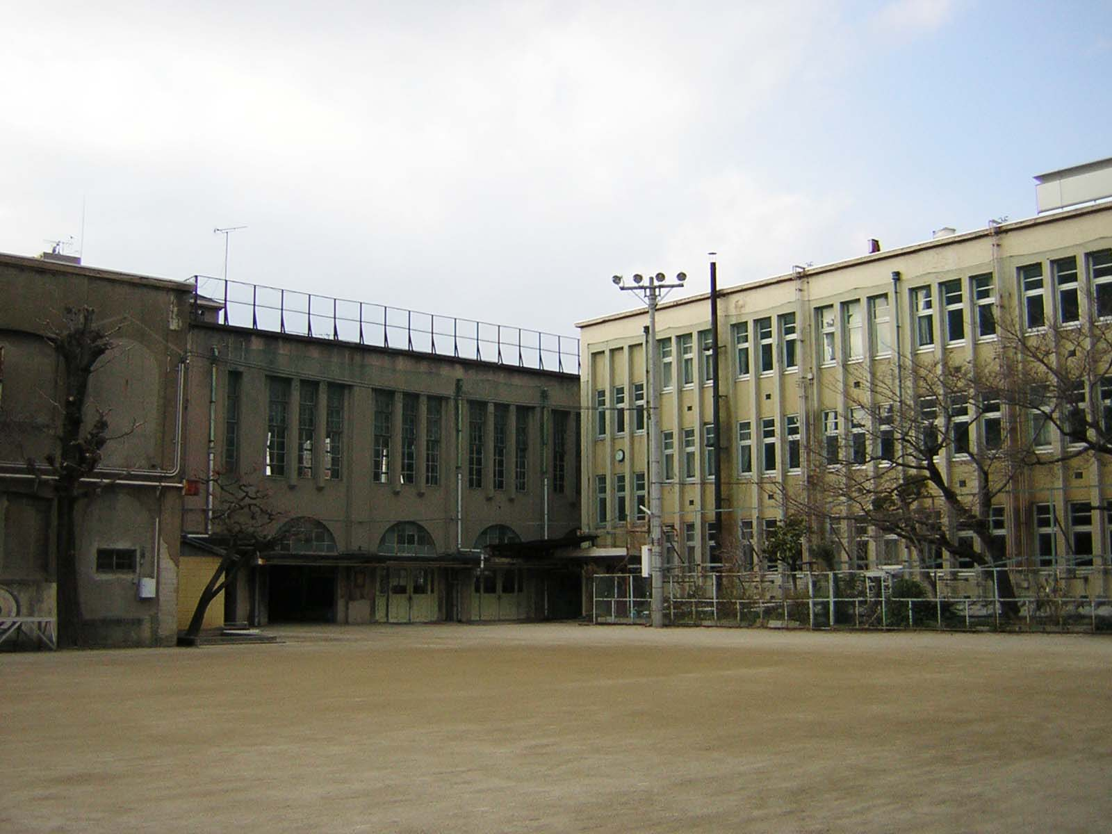 これは私自身が撮影したものです。